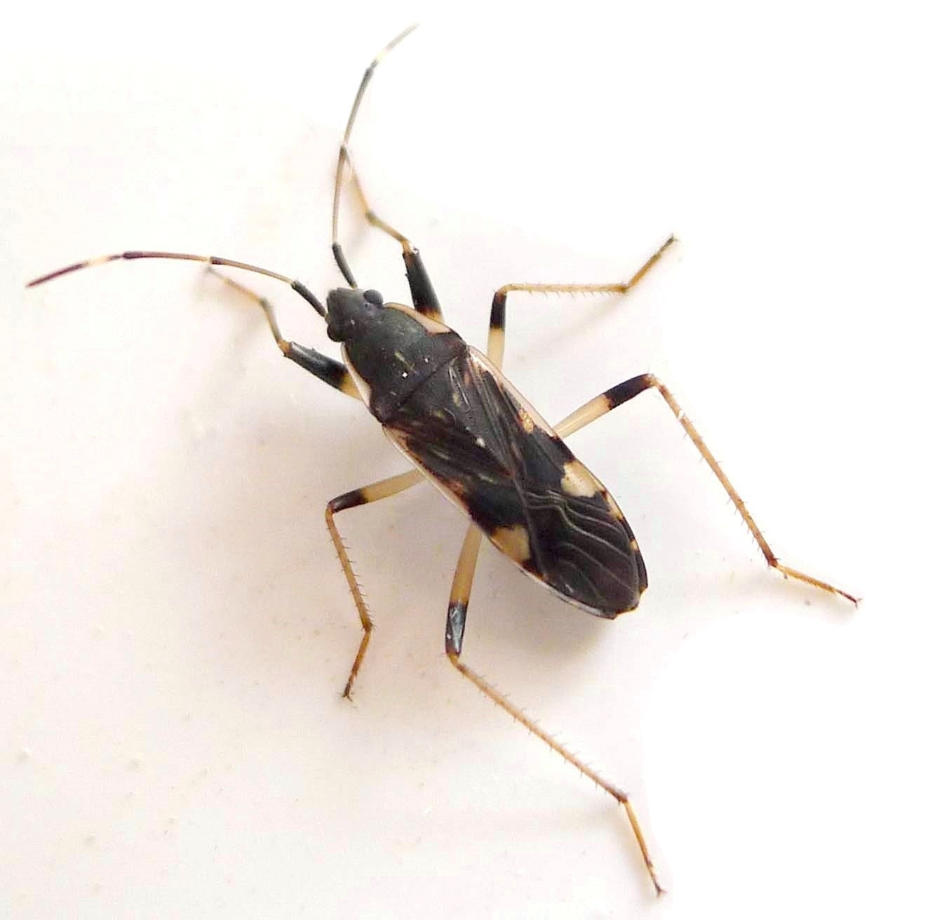 Jimena, Andalucia, Spain